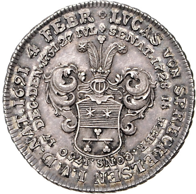 Médaille commémorative de Lucas von Spreckelsen, maire de Hambourg décédé en 1751. Y est figuré son blason. Médaille issue de la collection "Gaedechens" (1877). 29 mm, 7,30 grammes